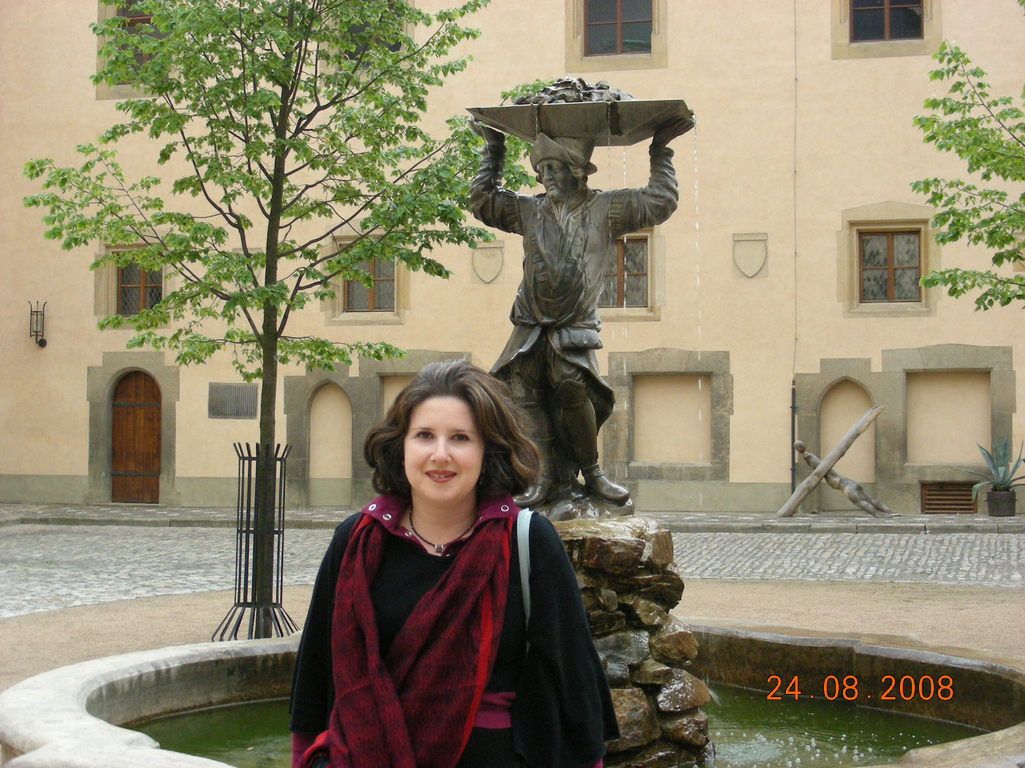 ויטה גורביץ